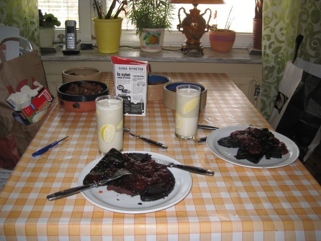 Blodpudding med lingonsylt och mjölk ~ vardagsbordet